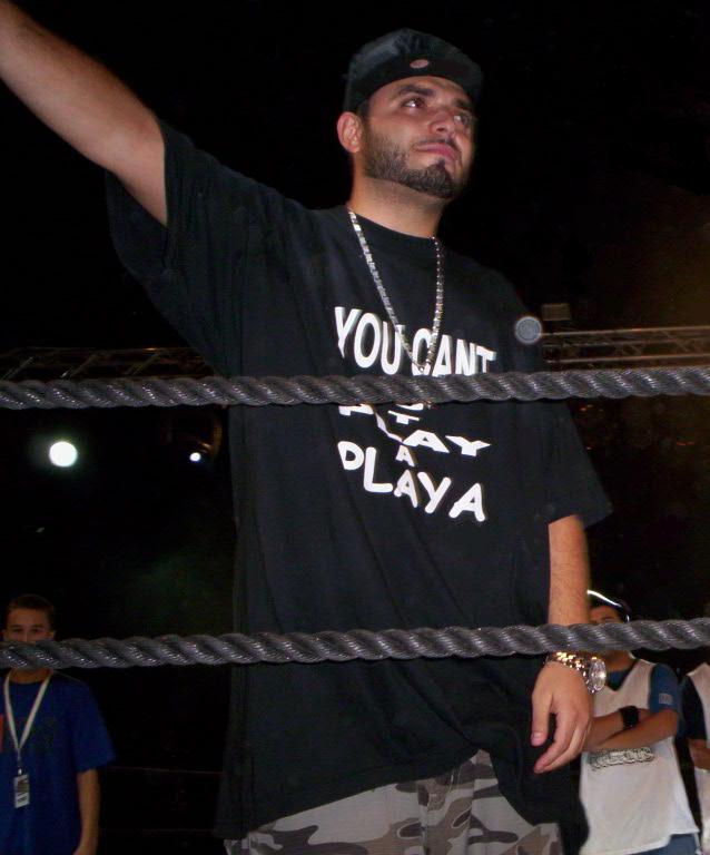 Subliminal